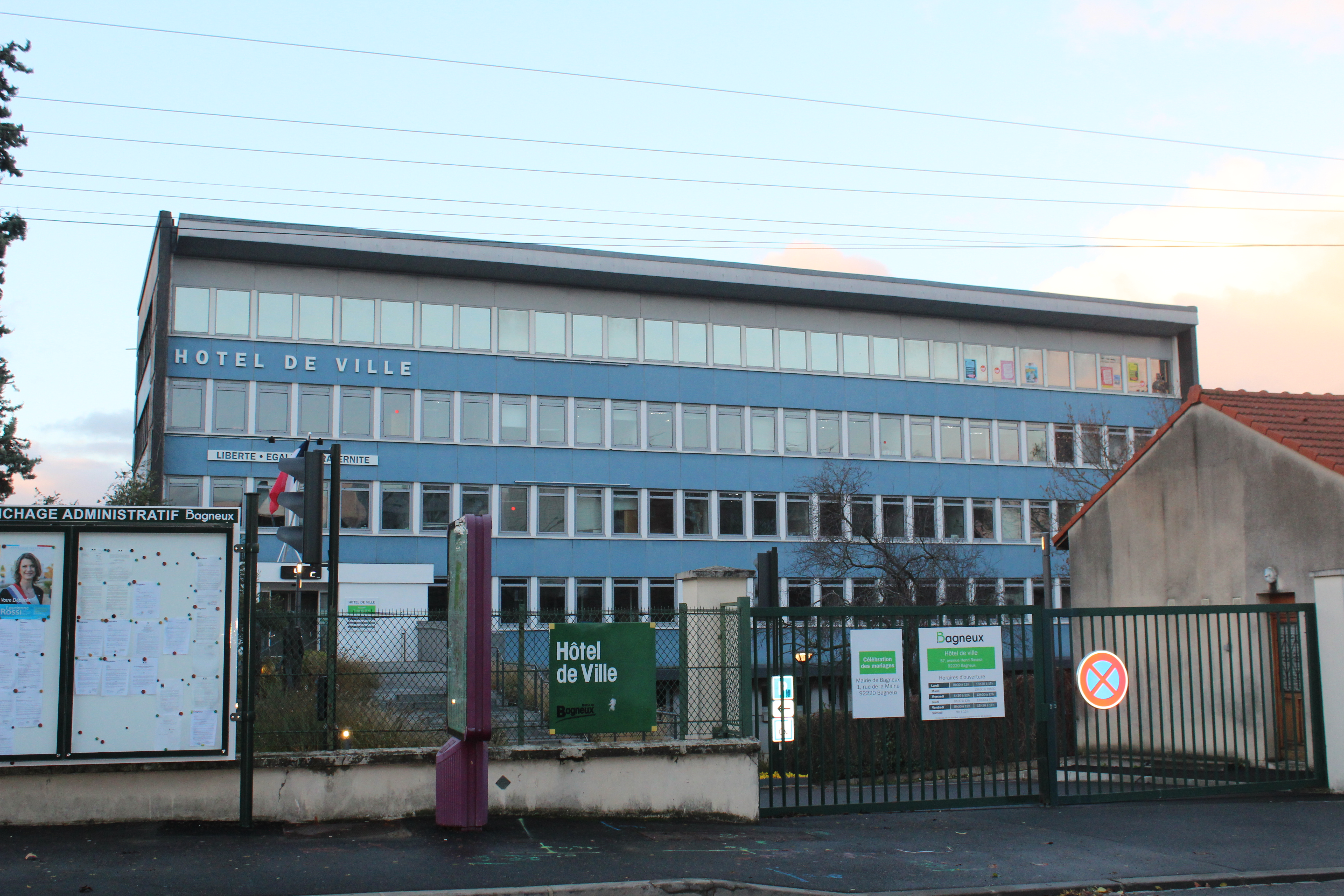 Hôtel de ville de Bagneux, Hauts-de-Seine.